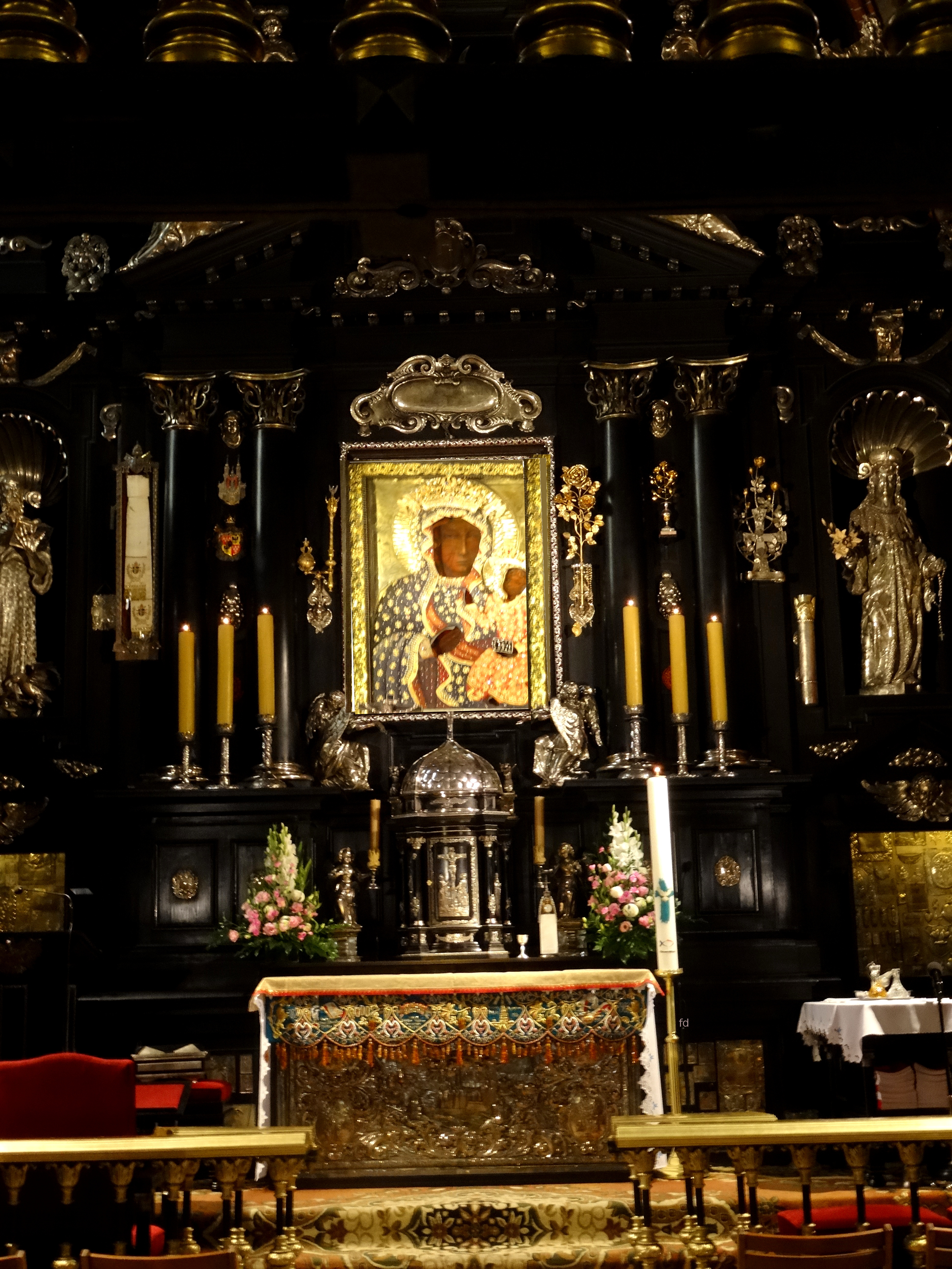 Pauliner Kloster Tschenstochau Kapelle der Schwarzen Madonna.